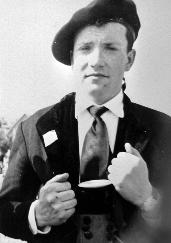 Étienne Rivoallan en costume avec sa bombarde.